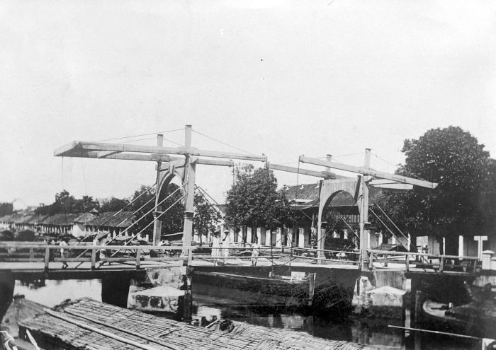 Repronegatief. Dubbele ophaalbrug (Hoenderpasarbrug), Batavia